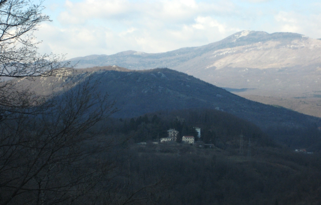 Psihijatrijska bolnica Lopača kod Rijeke